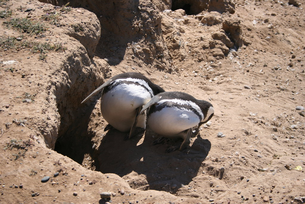 Magellanic penguin (Peninsula Valdés, Patagonia, Argentina) by Michaël CATANZARITI